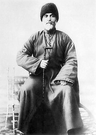 Дени Шейх